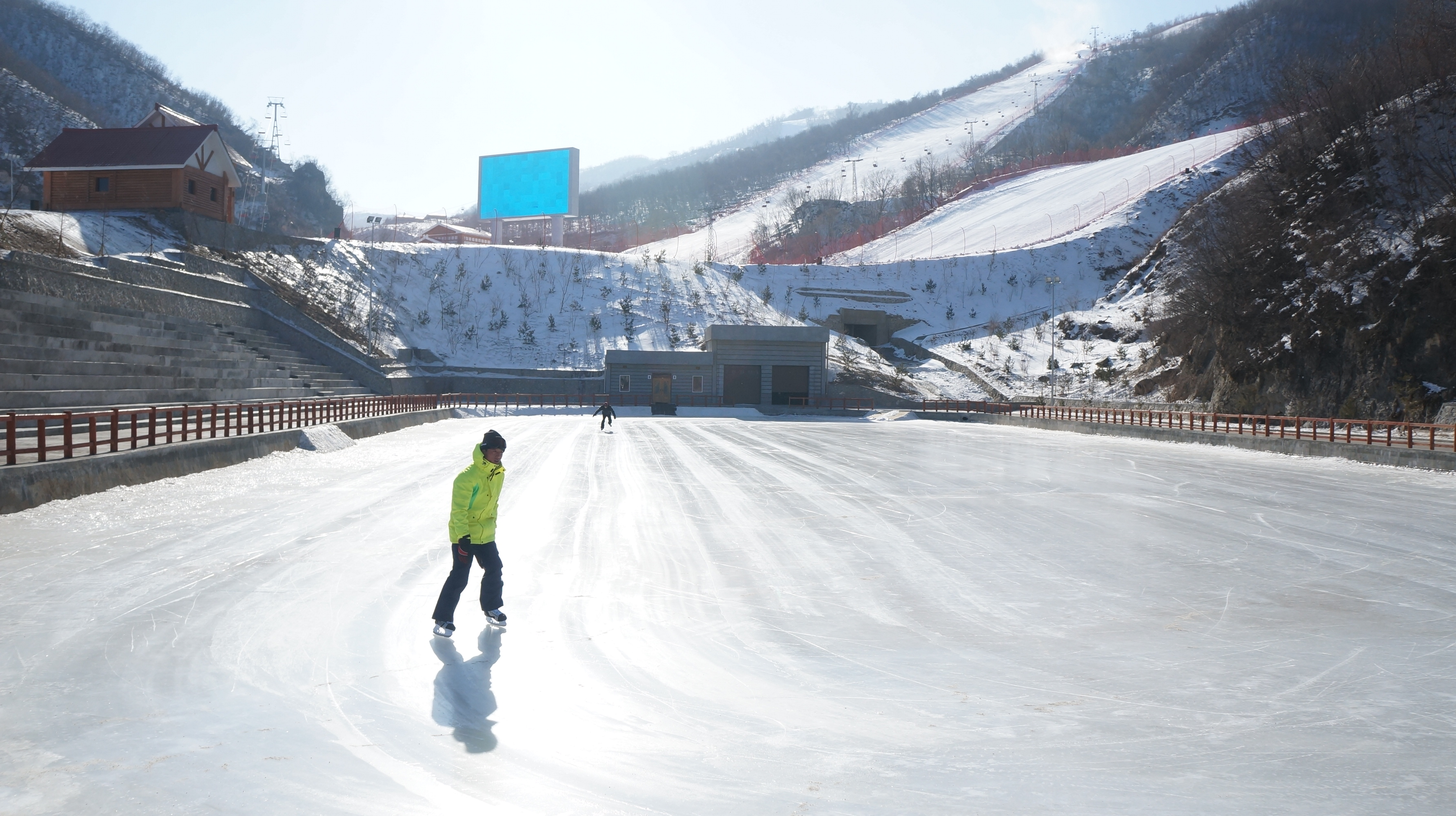 Ice skating rink